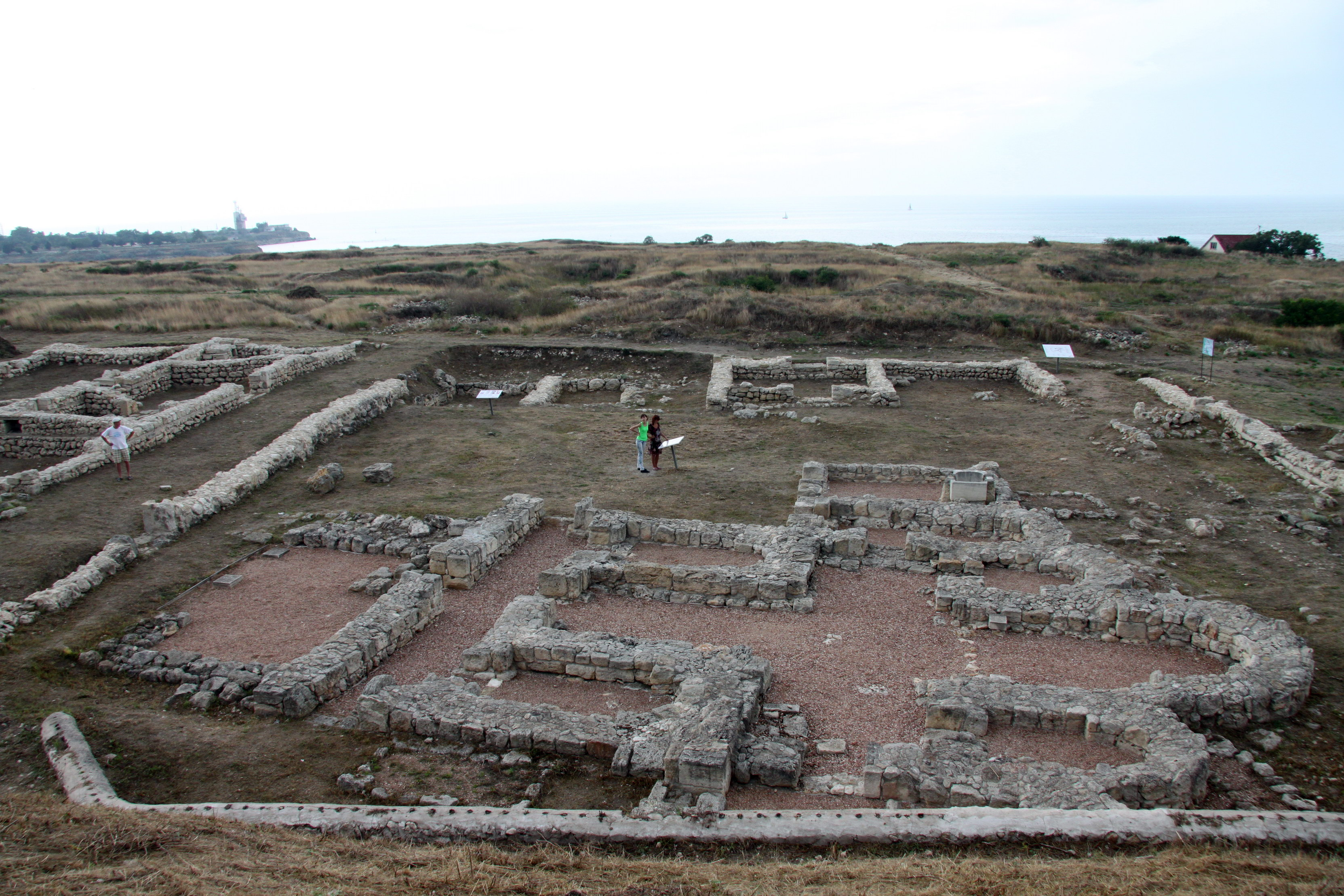 Комплекс "Стародавнє місто Херсонес-Таврійський", Севастополь, вул. Древня, 1